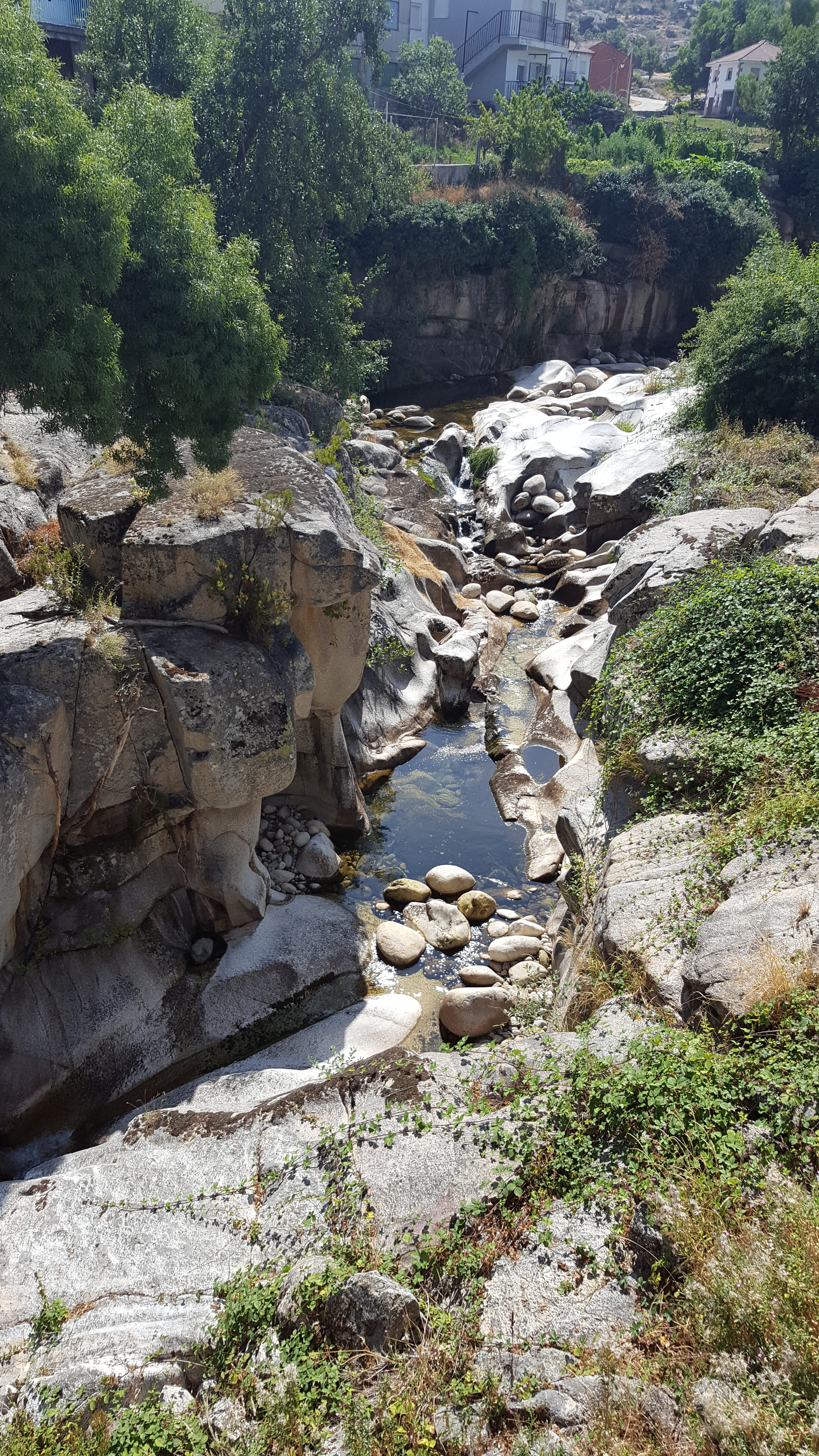 Garganta de Galín Gómez en Nava del Barco Ávila España